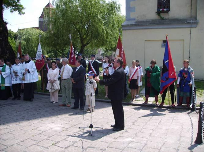 Odsłonięcie tablicy pamiątkowej odrestaurowania Wieży Ratuszowej w Rynku w Bierutowie - przemówienie burmistrza Grzegorza Michalaka